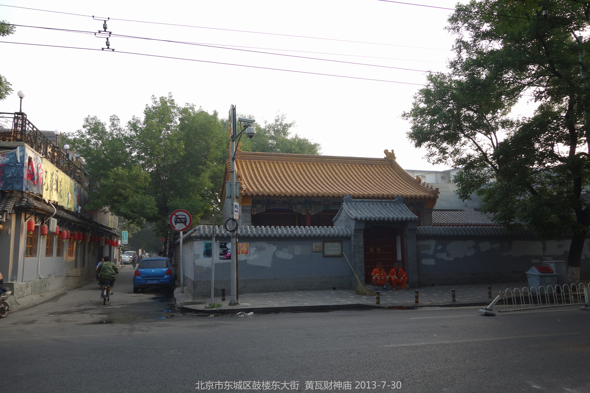 黄瓦财神庙 huang wa chai shen miao